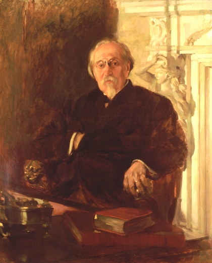 deze afbeelding die geschilderd is door Columbano Bordalo Pinheiro (1857-1929) en derhalve is de maker meer dan 70 jaar geleden overleden.